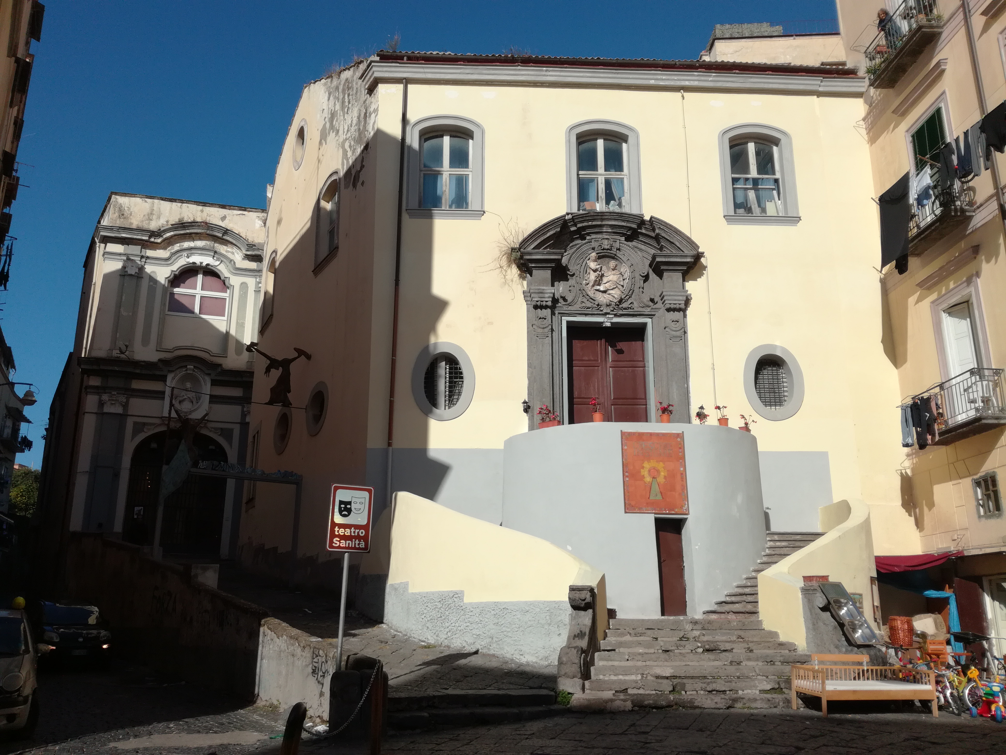 Immacolata e San Vincenzo, Napoli